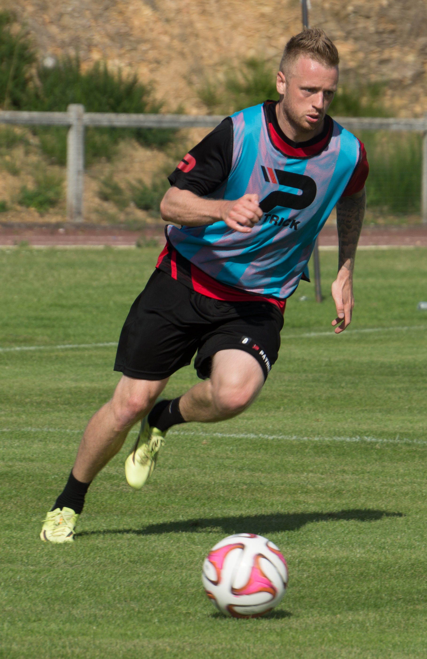 Ronnie Schwartz à l'entrainement le 10 juillet 2014